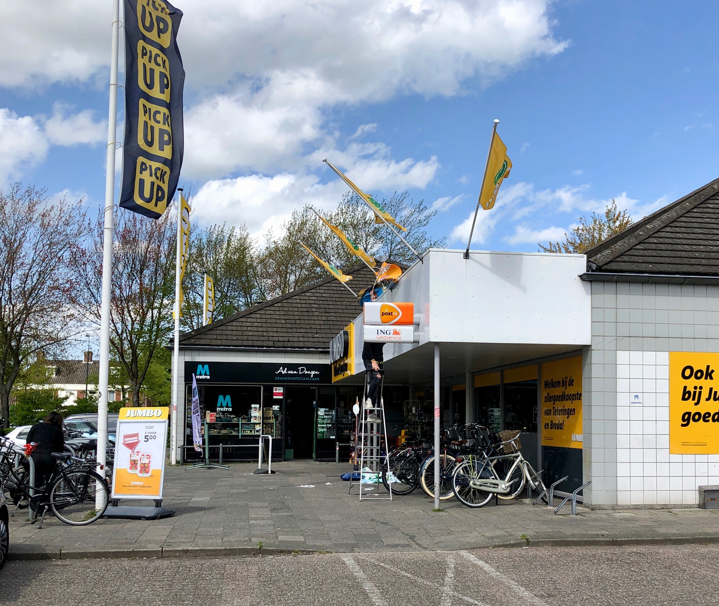 Zicht op een deel van de supermarkt Jumbo, Scheperij 3, 4847 EZ Teteringen en slijterij in Teteringen